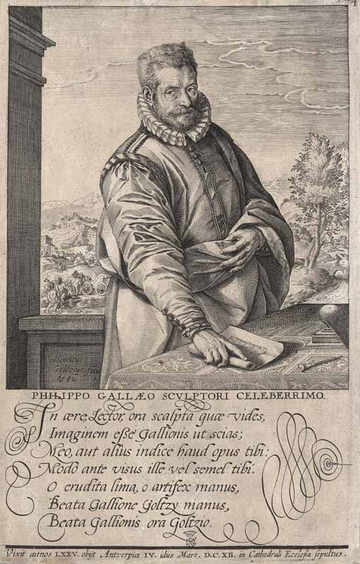 Portret van Philip Galle